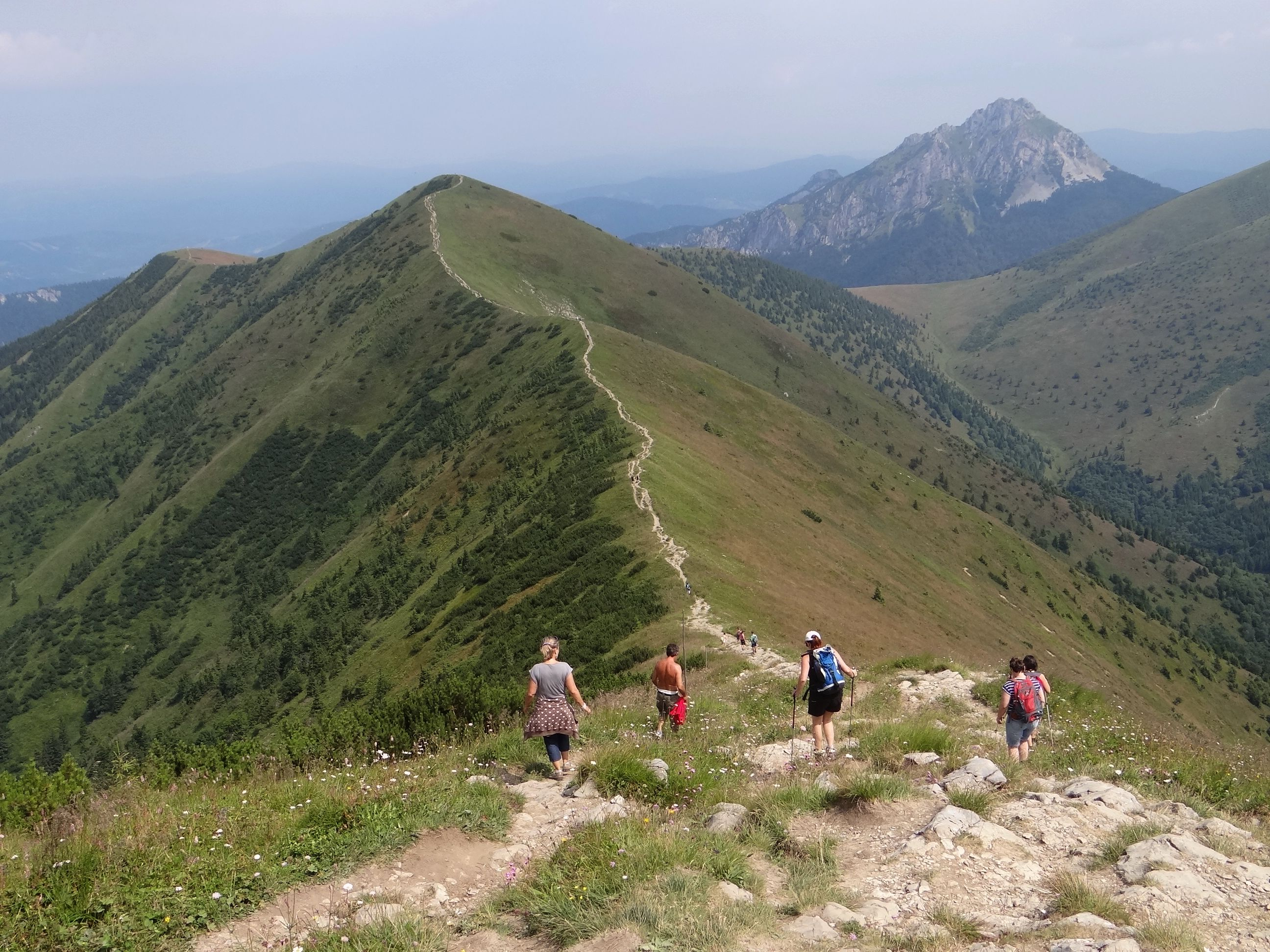 Steny